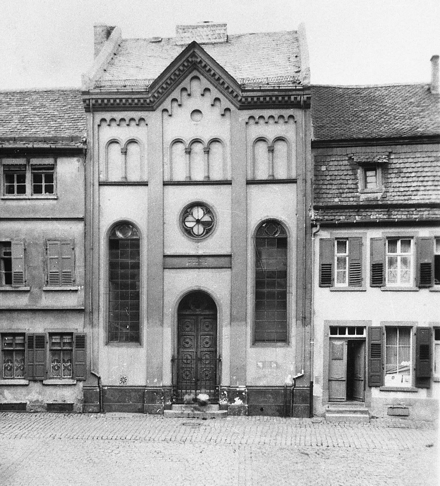 Die Levy’schen Synagoge von vorne